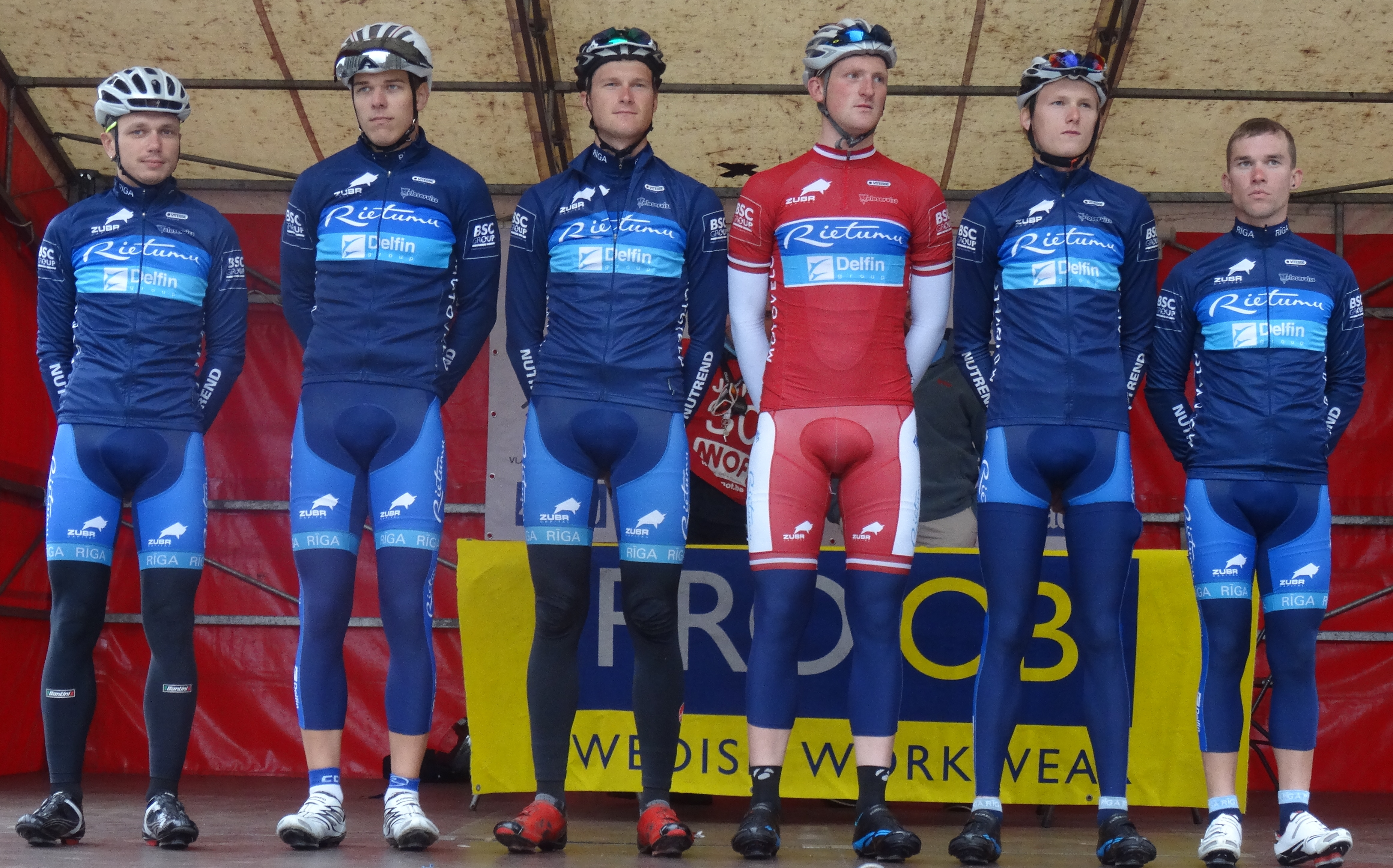 Reportage photographique réalisé le dimanche 14 septembre à l'occasion du départ et de l'arrivée du Grand Prix Jef Scherens 2014 à Louvain, Belgique.